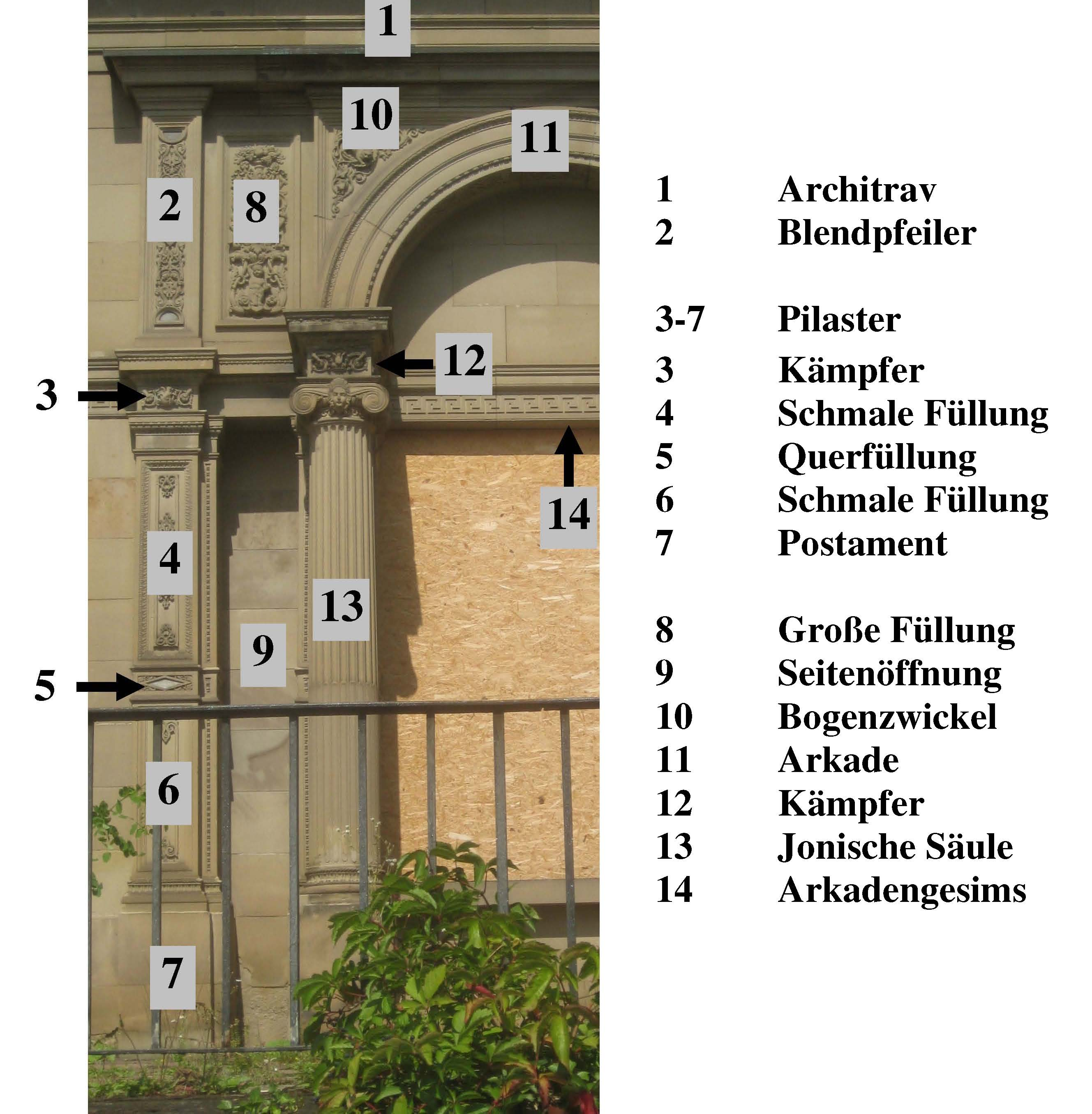 Stuttgart, Villa Berg, Südfassade, Seitenportal, Bauteilplan.